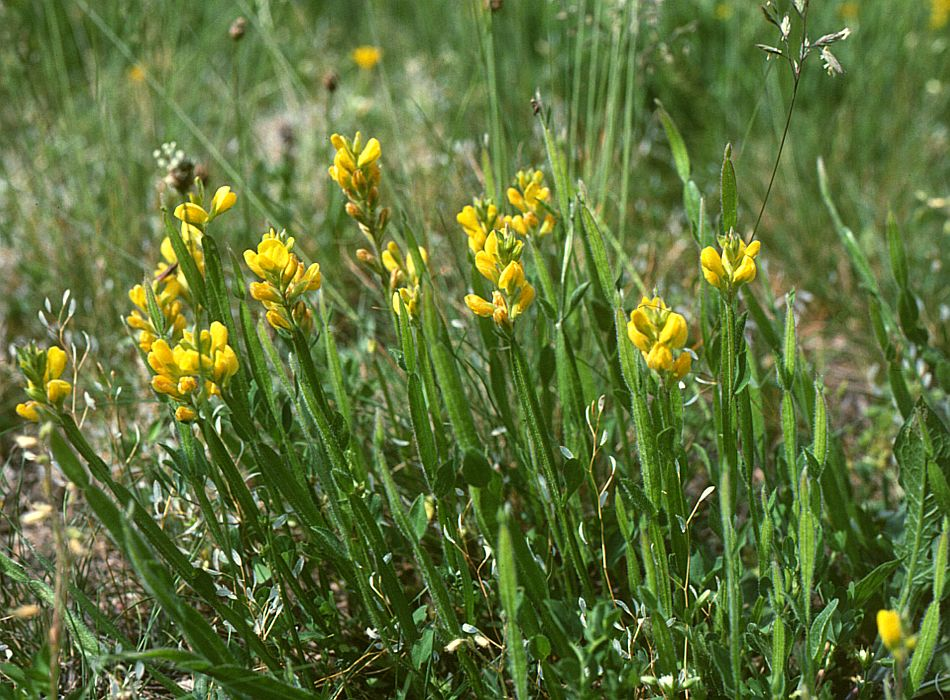 Flügel-Ginster (Genista sagittalis), Hülsenfrüchtler (Fabaceae), Schmetterlingsblütler (Faboideae) - Österreich/Austria/Autriche: Steiermark, Sausal, Demmerkogel